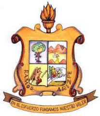 Escudo de Armas del Ayuntamiento de Ramos Arizpe, Coahuila, México